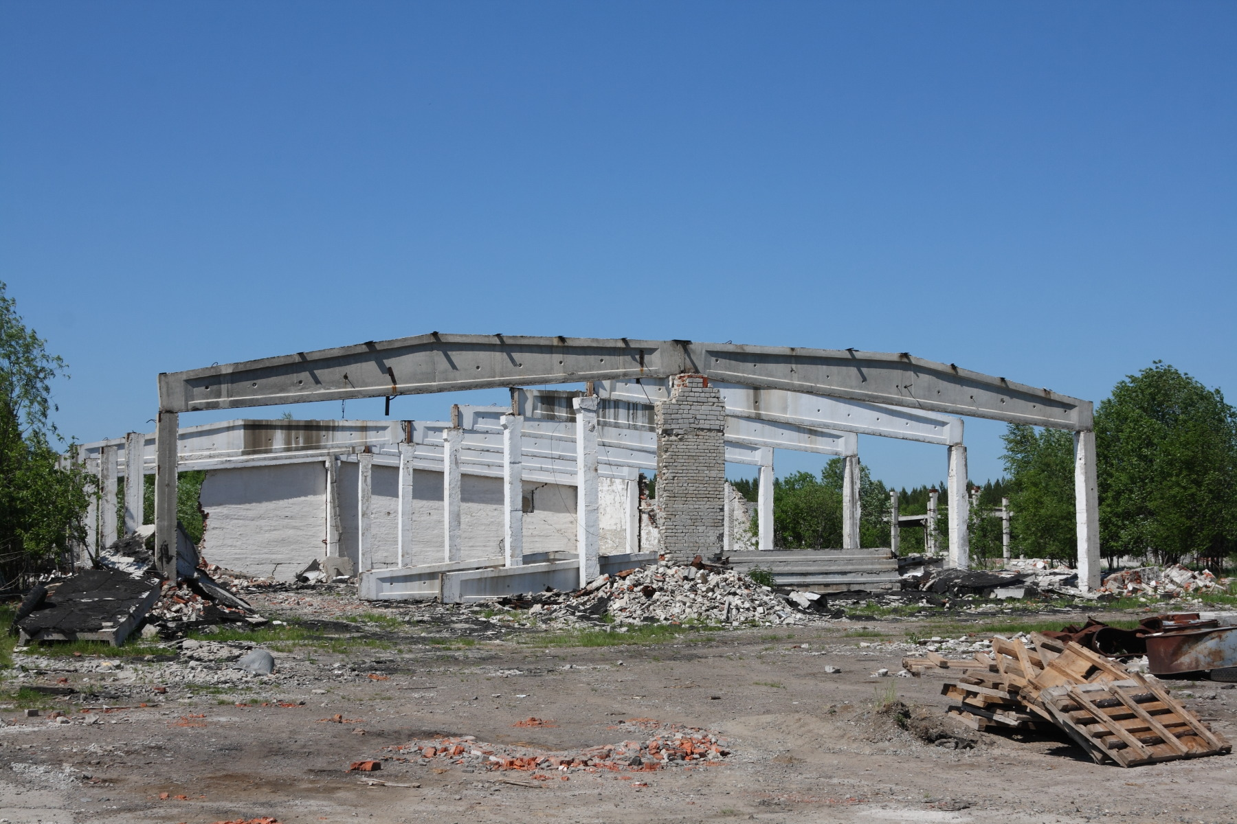 6-я площадка. Остатки воинской части под Итаткой. Томское.